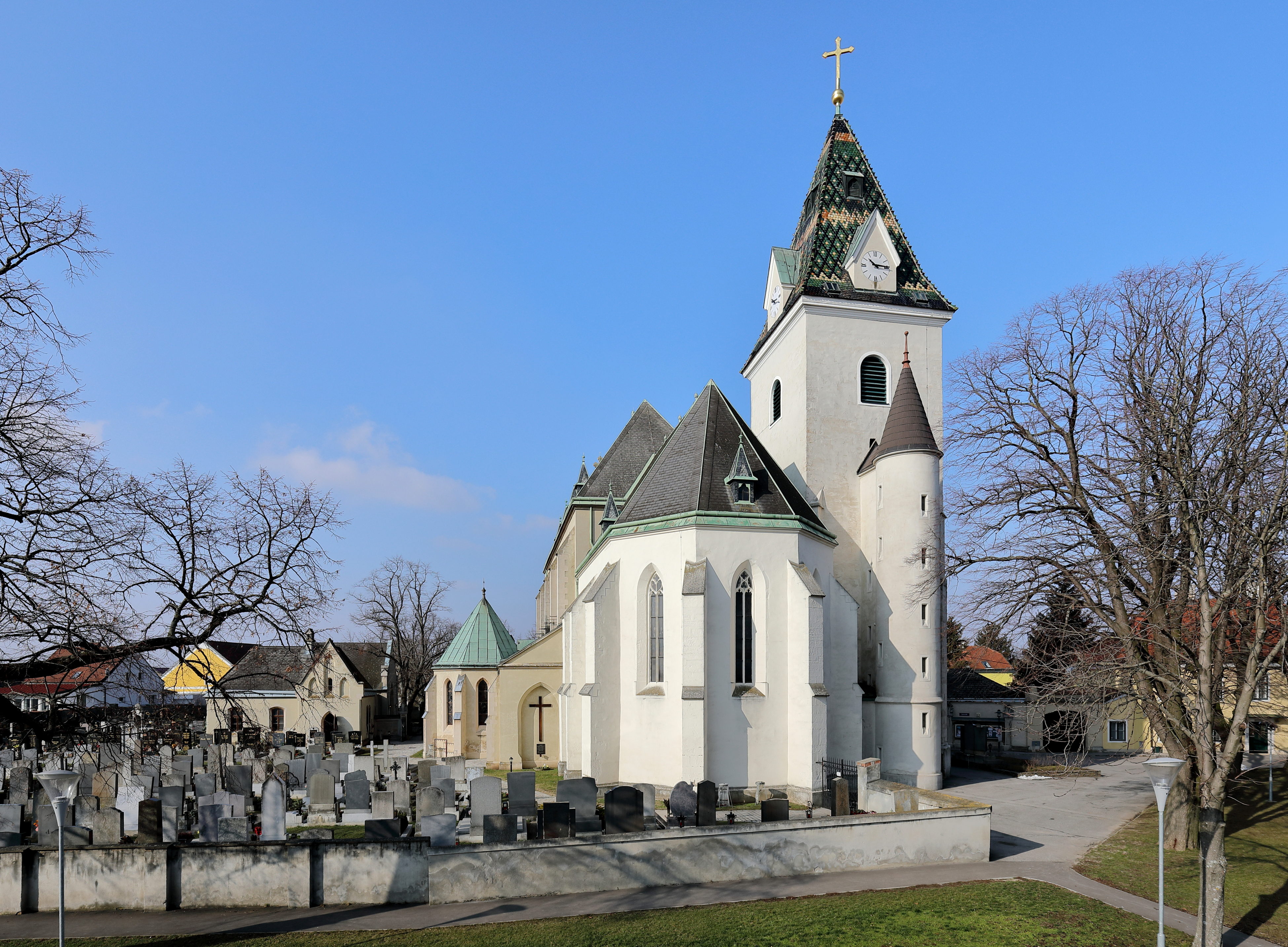 Ostansicht der röm.-kath. Pfarrkirche Mariae Himmelfahrt in der niederösterreichischen Marktgemeinde Großengersdorf. Der Chor mit 5/8-Schluß wurde Ende des 14. Jahrhunderts errichtet und das Untergeschoß des wuchtigen Nordturmes stammt aus dem 15. Jahrhundert. Das neogotische Langhaus wurde von 1897 bis 1901 nach Plänen des Architekten Eugen Schweigl errichtet.